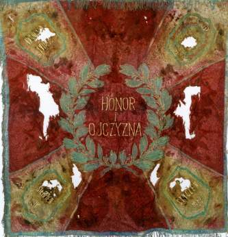 Sztandar 73 Pułku Piechoty (rewers przed konserwacją)autor: Piotr Sworzeń. Wszelkie prawa do rozpowszechniania zdjęcia zastrzeżone.